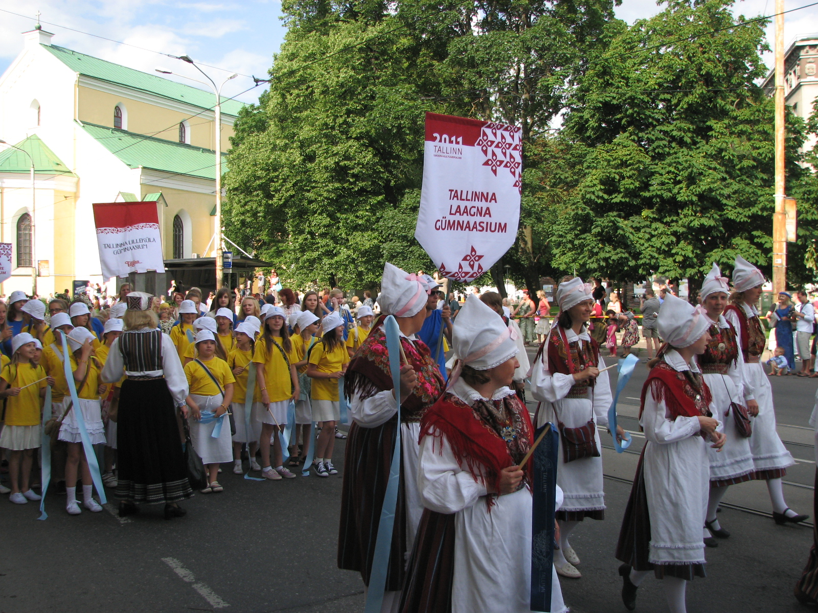 Tallinna Laagna Gümnaasiumi esindus XI noorte laulu- ja tantsupeo rongkäigus